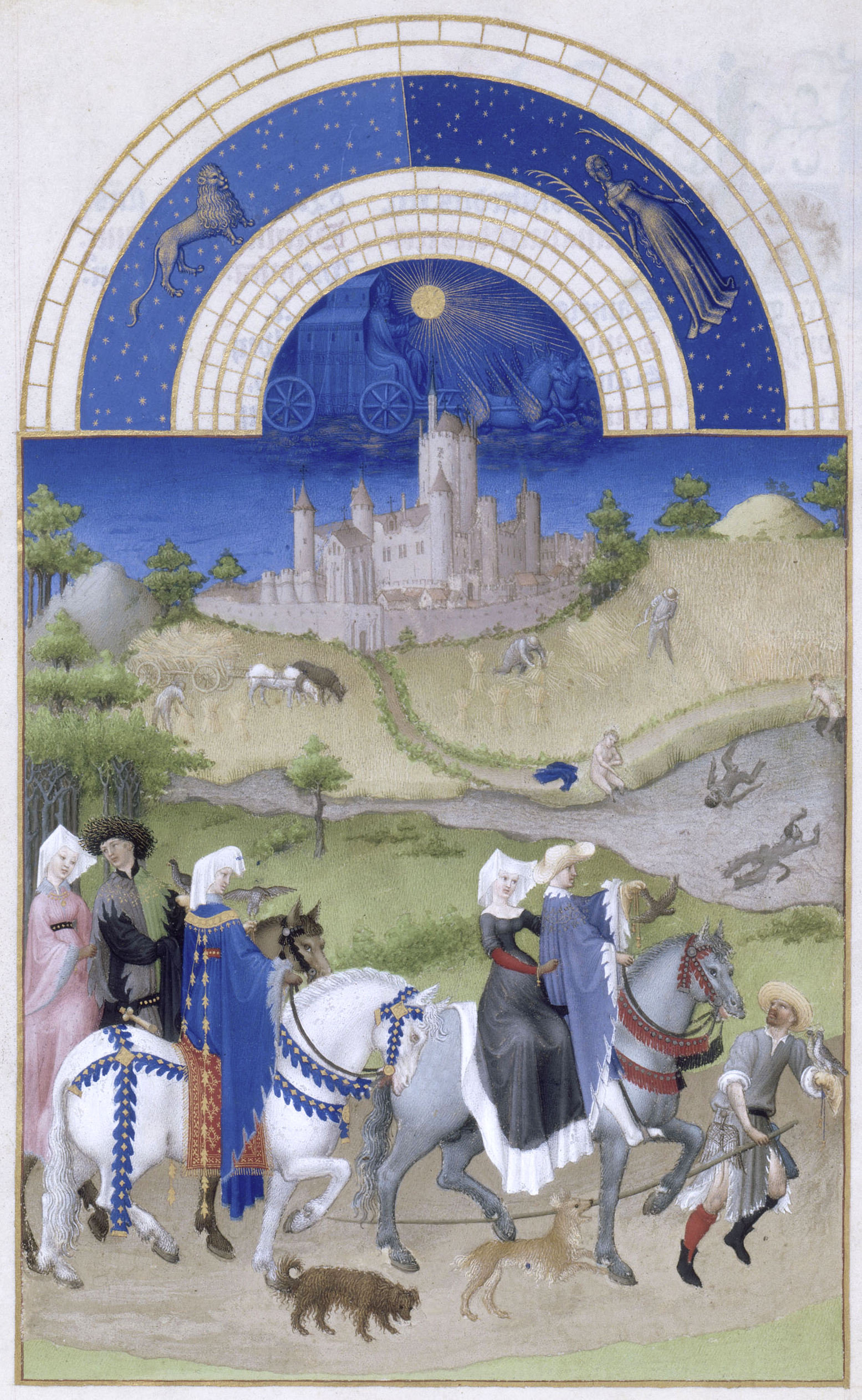 Au premier plan, figure une scène de fauconnerie : le cortège à cheval part pour la chasse, précédé d'un fauconnier. Celui-ci tient dans la main droite le long bâton qui lui permettra de battre arbres et buissons pour faire s'envoler le gibier. Il porte deux oiseaux au poing et, à la ceinture, un leurre en forme d'oiseau que l'on garnissait de viande pour inciter les faucons à revenir. Le cortège est accompagné de chiens destinés à lever le gibier ou à rapporter celui qui aura été abattu. Sur leur cheval, trois personnages portent un oiseau, sans doute un épervier ou un faucon émerillon. Au second plan sont représentés les travaux agricoles du mois d'août. Un paysan fauche le champ, un deuxième réunit les épis en gerbes alors qu'un troisième les charge sur une charrette tirée par deux chevaux. À proximité, d'autres personnages se baignent dans une rivière — peut-être la Juine — ou se sèchent au soleil. À l'arrière-plan se dresse le château d'Étampes, que le duc de Berry avait acquis en 1400, à la mort de Louis d'Évreux, comte d'Étampes. Derrière les remparts, on distingue le donjon quadrangulaire et la tour Guinette, qui existe toujours.